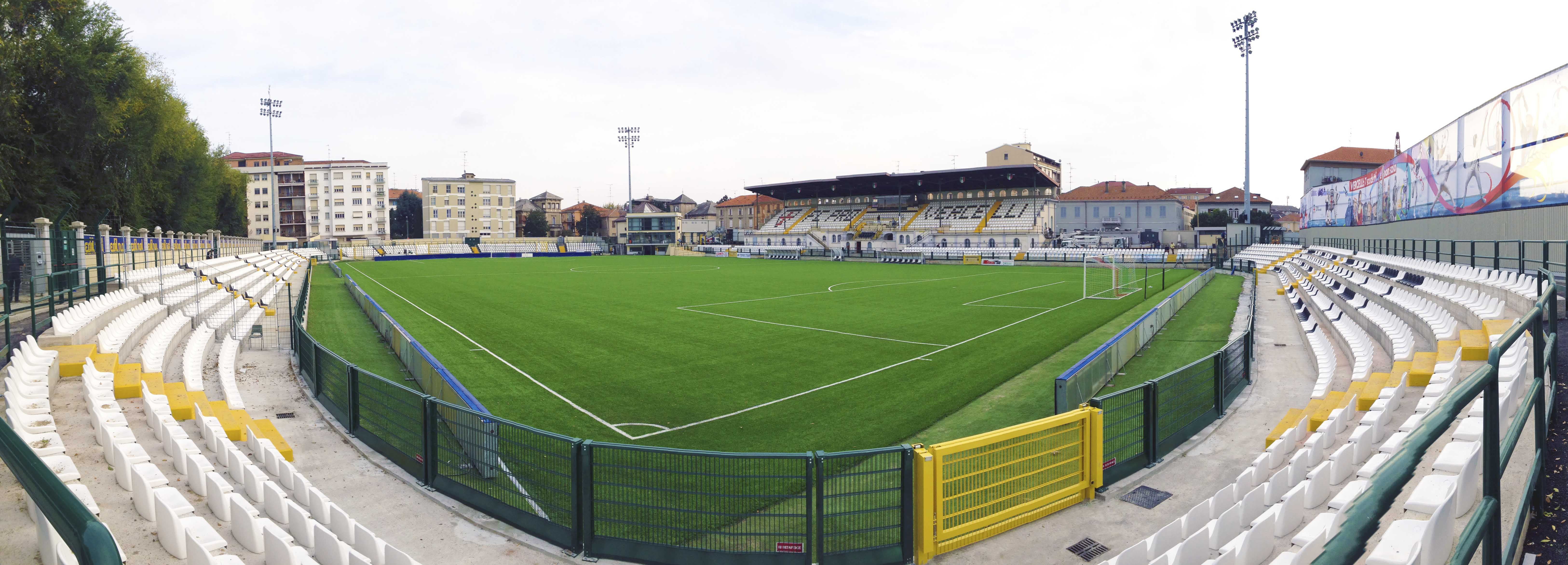 Vista sull'interno dello stadio Silvio Piola di Vercelli (dalla curva ovest) nel 2012